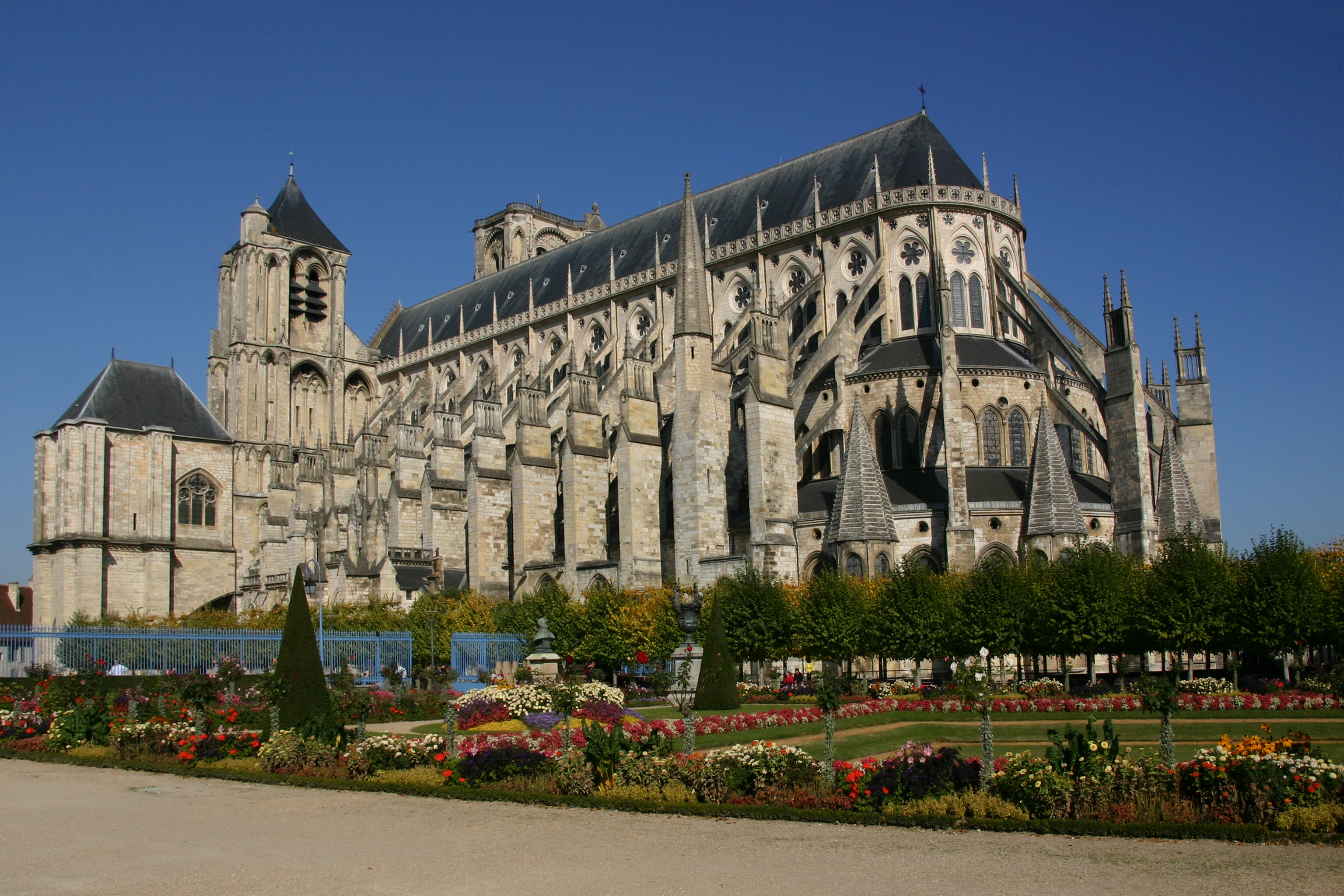 Kathedrale Saint-Étienne in Bourges